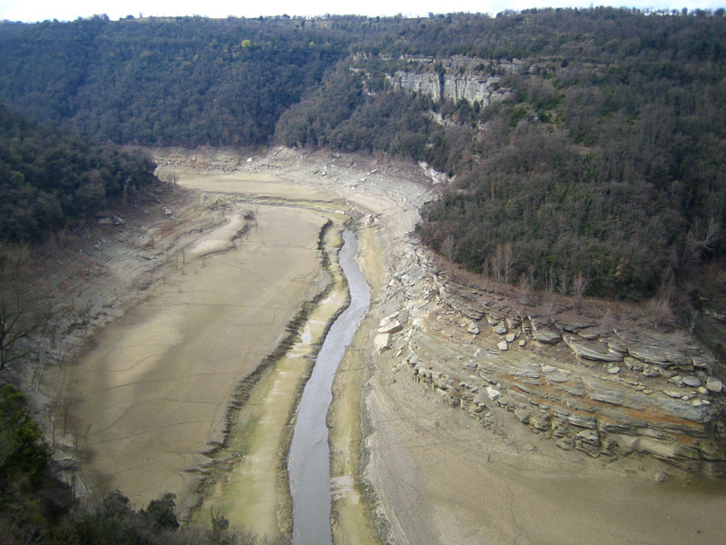 Sequera de l'embassament de Sau, Vic (Osona), Catalunya. Sequía del pantano de Sau, Vic, Cataluña. Drought at the Sau dam, Vic, Catalonia.